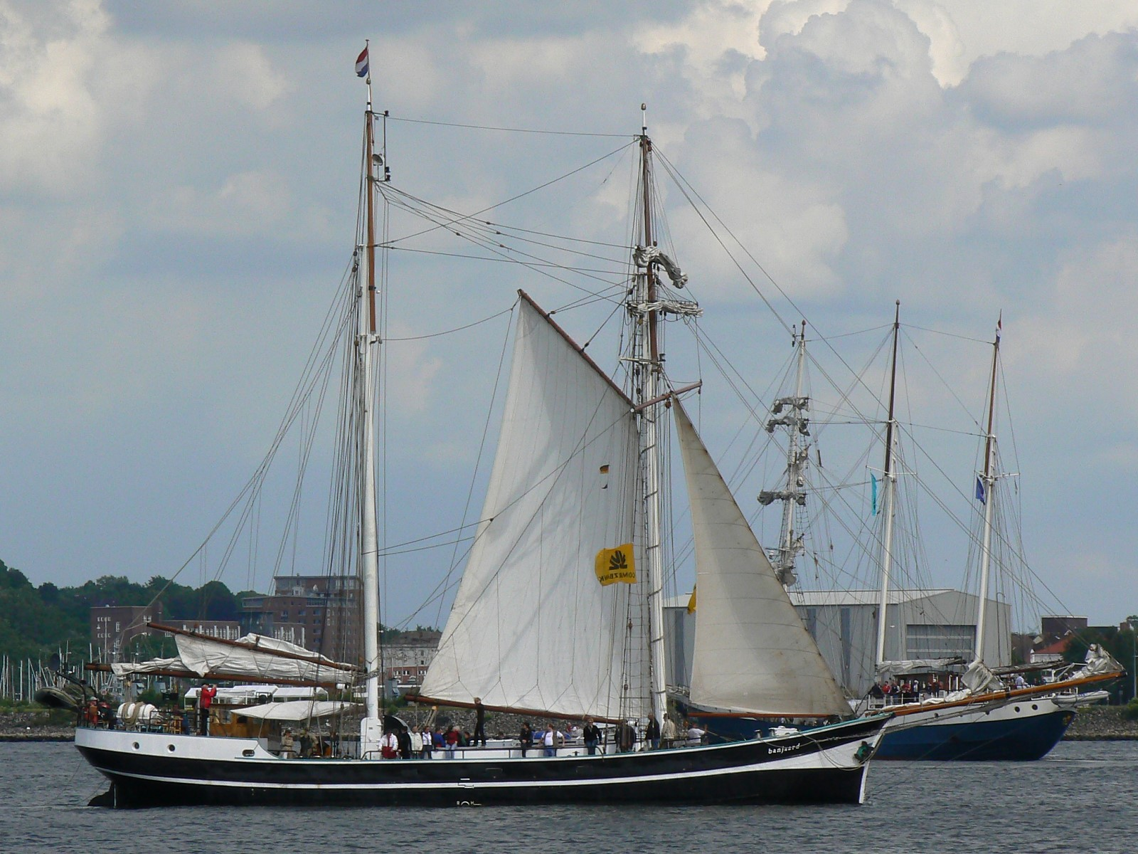 Segelschiff (Topsegelschoner) Banjaard auf der Kieler Woche 2007. IMO Number: 9096959 MMSI Number: 245898000 Callsign: PCXV Length: 29 m Beam: 6 m